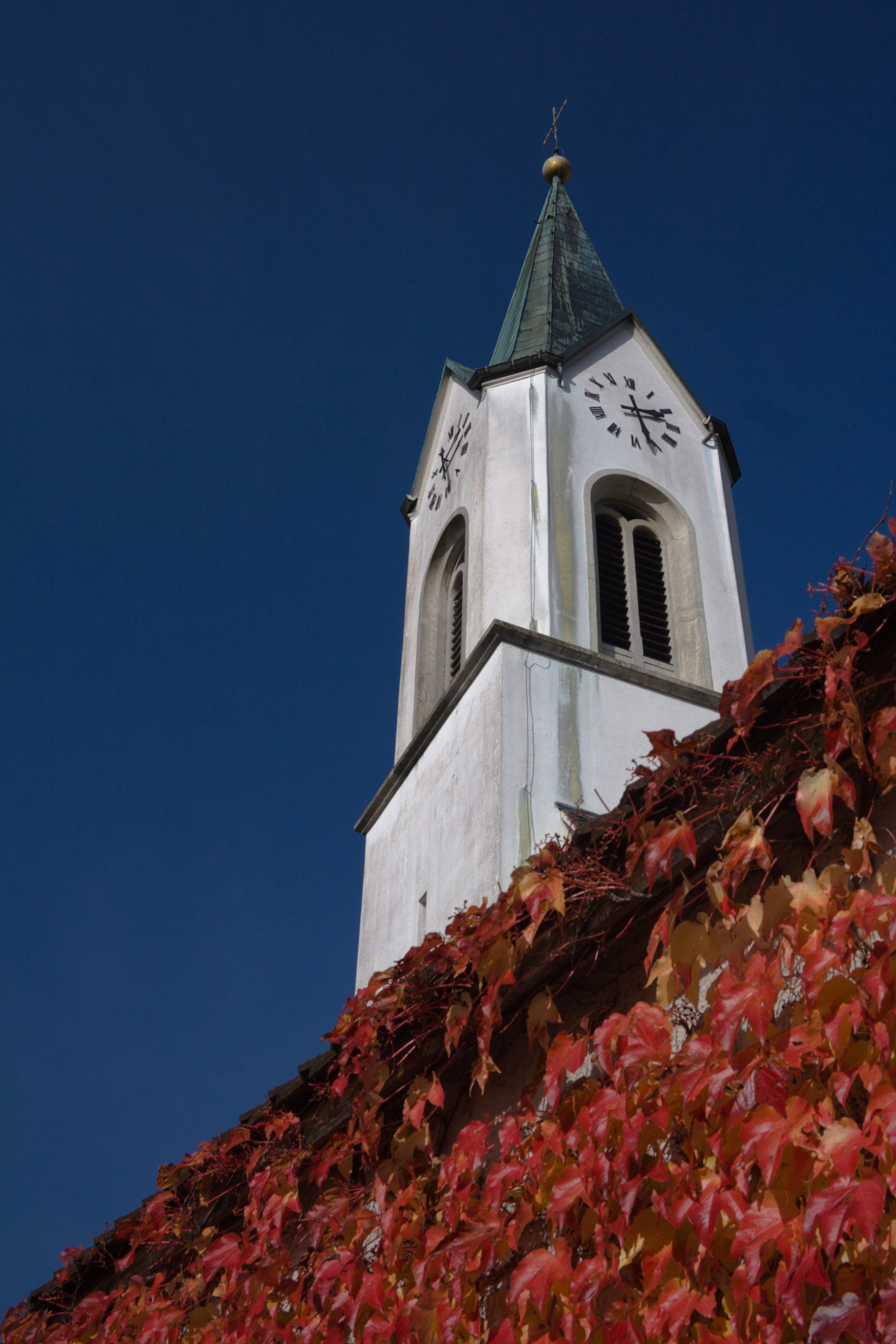 Turm der Wittnauer Kirche, Schweiz